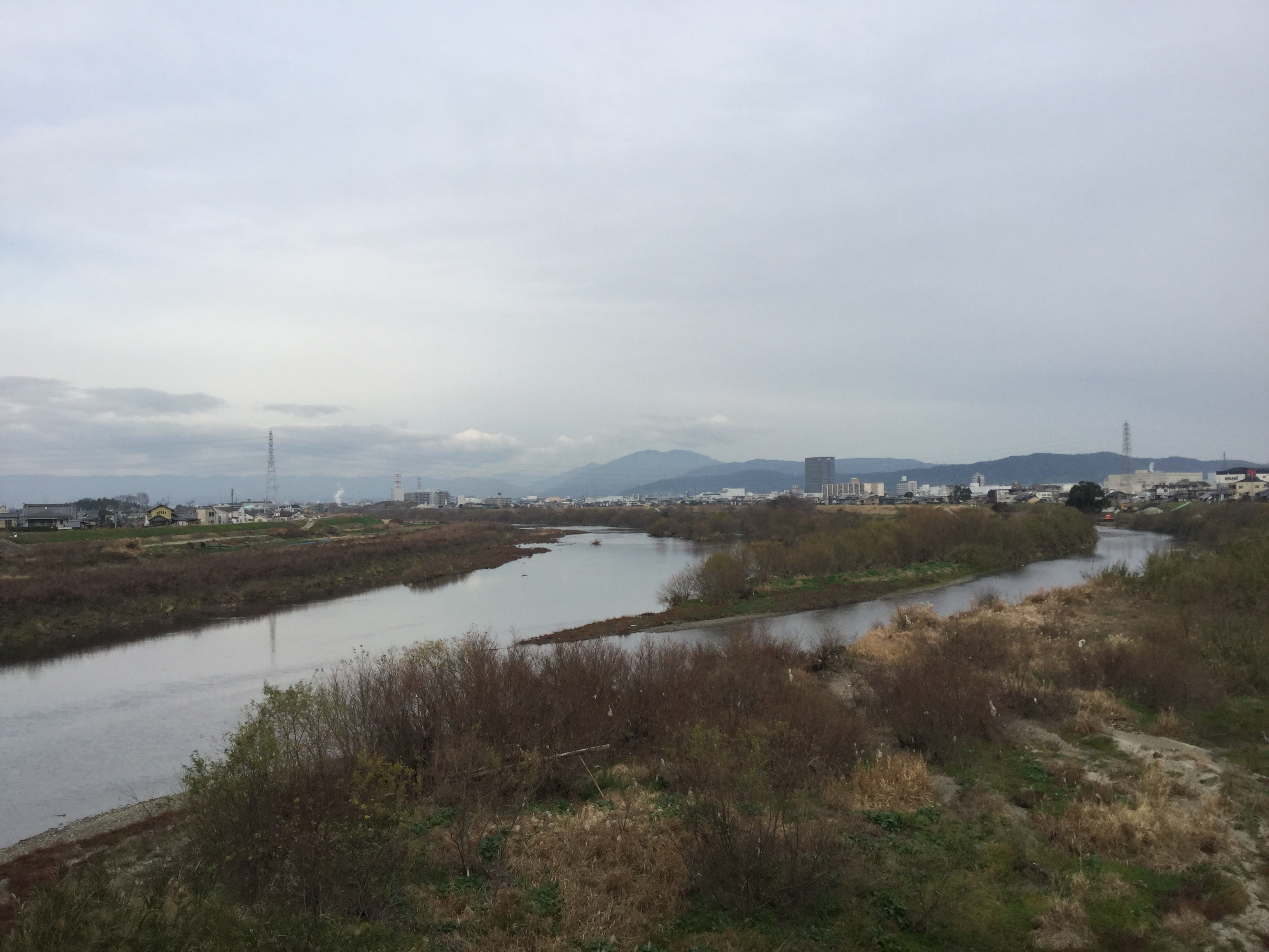 鳥羽街道にある湊